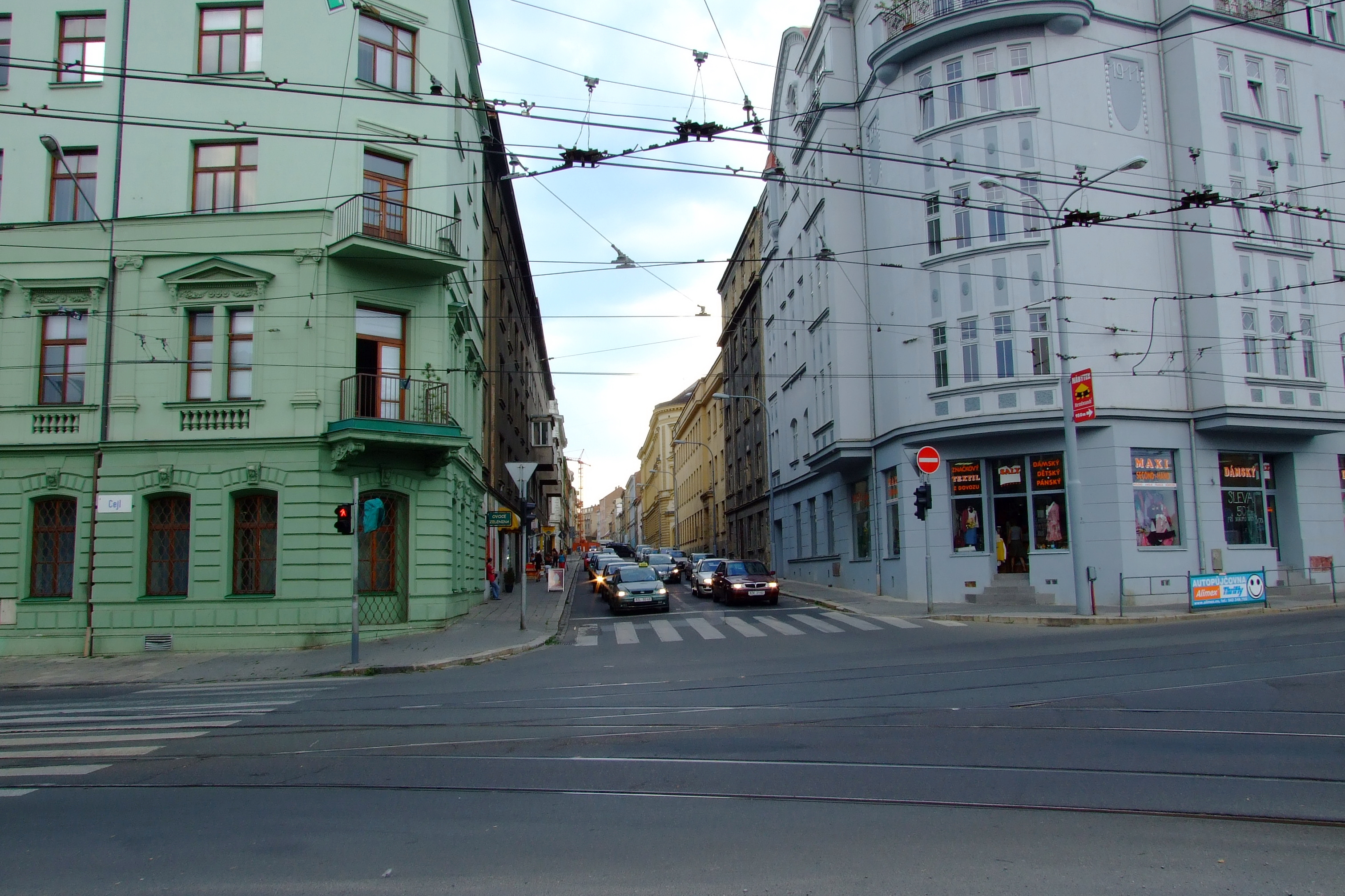 Brno-Zábrdovice - Francouzská ulice z křižovatky s Cejlem